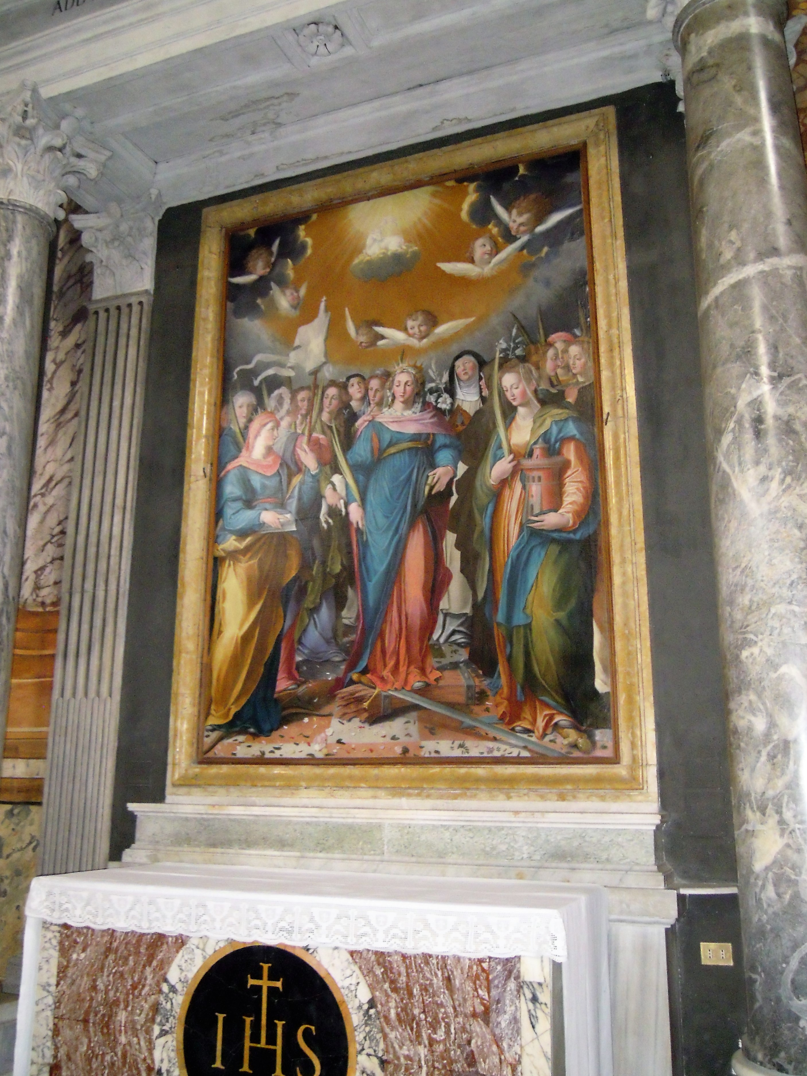 Roma, basilica di San Vitale - Sante vergine martiri di Giovanni Battista Fiammeri